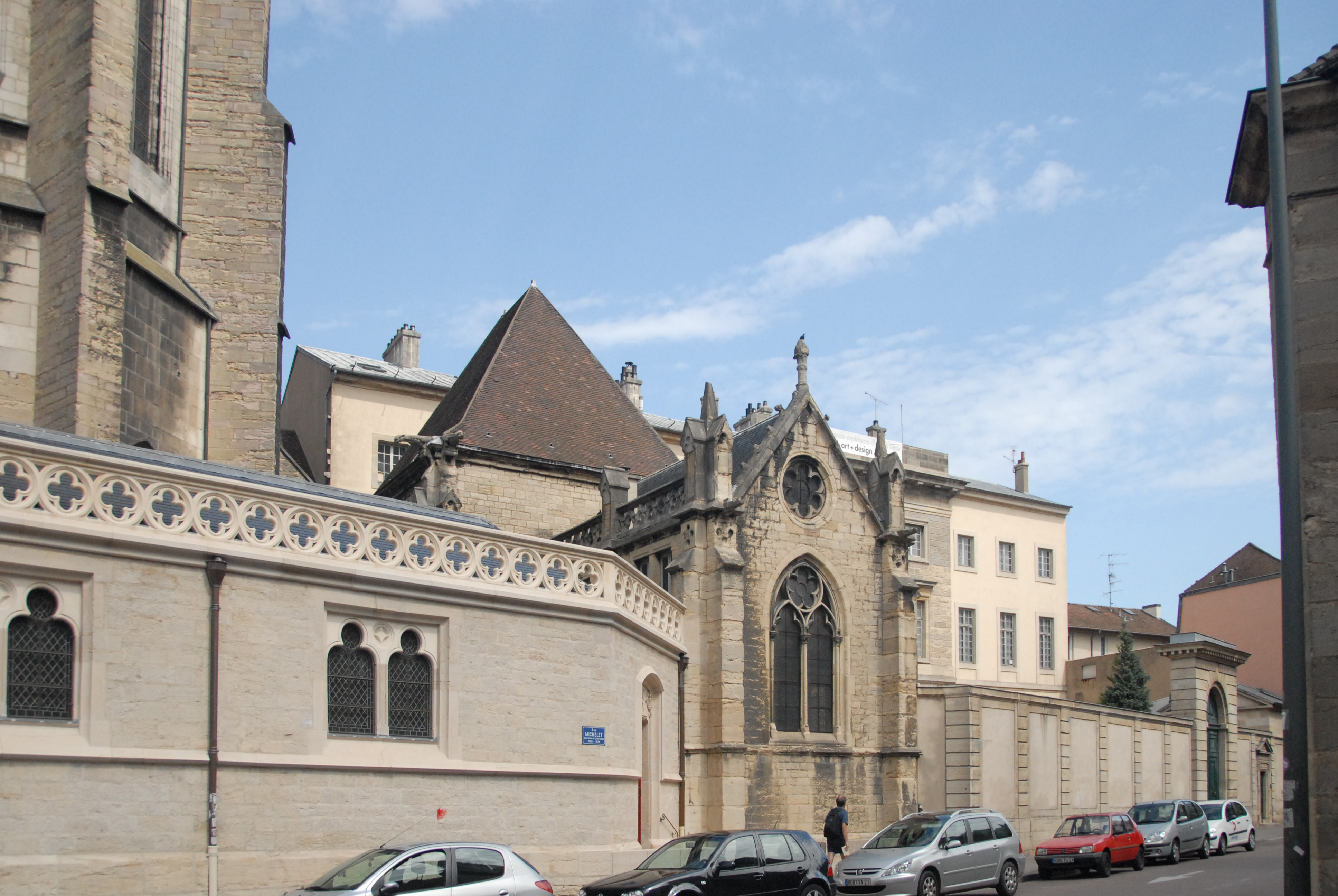 St-Bénigne, Verbindungsgang zur Krypta von S